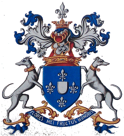 Armoiries de la famille du Bus.Blasonnement: "d'azur à un écusson d'argent, accompagné en orle de quatre fleurs de lis."